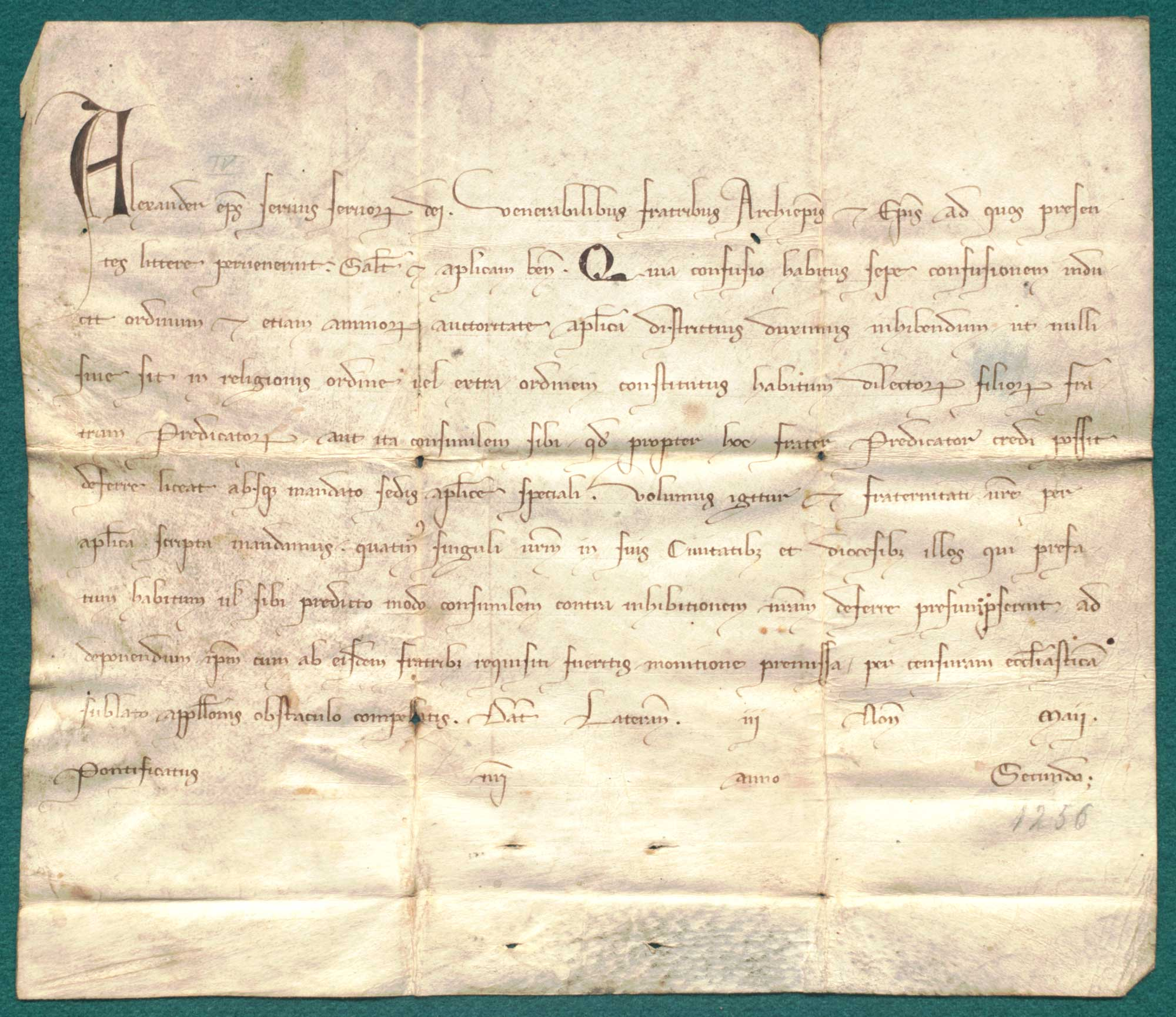 Aleksander IV, papież, poleca abpowi i bpom polskim, aby przestrzegali konstytucji zakonu dominikanów. Język: łac. Opis zewnętrzny: oryg., 1 k. pergaminowa, 22,4 x 17,5 + 1,9 cm; brak bulli